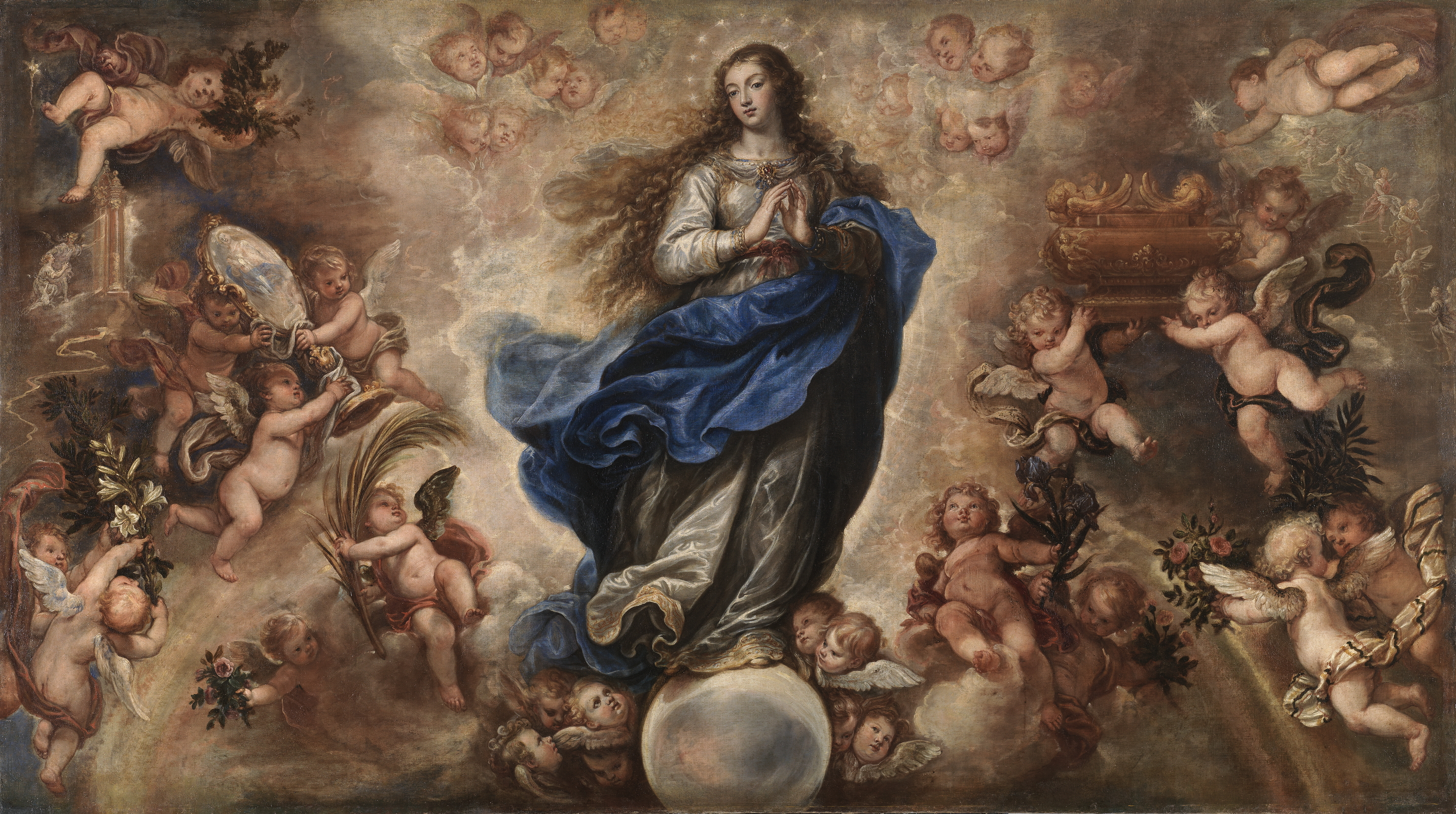 La obra representa la Inmaculada Concepción de la Virgen María, madre de Jesucristo.